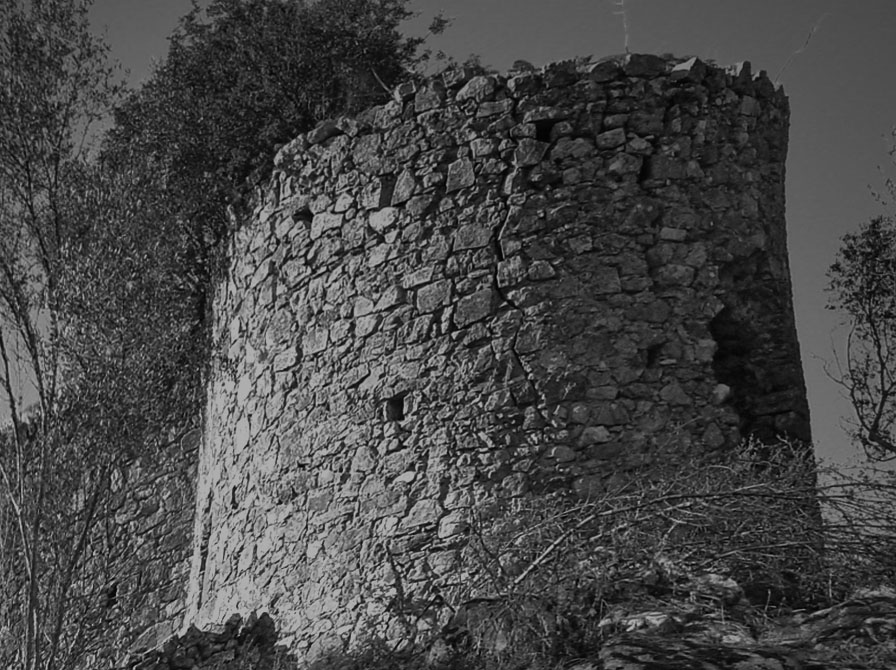 Ruinas Castillo de Castellanos, próximo a Cordobilla de Lácara pero ya en la proviencia de Cáceres. Es de propiedad privada y se sitúa en la dehesa que lleva su nombre, Castillo de Castellanos.